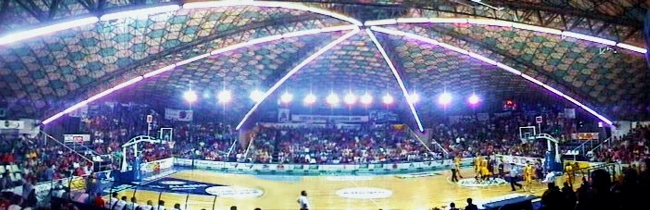 El equipo de básquet del Club Argentino de Junín disputando un partido en el estadio montado en la Cúpula de la Sociedad Rural de Junín, Argentina.